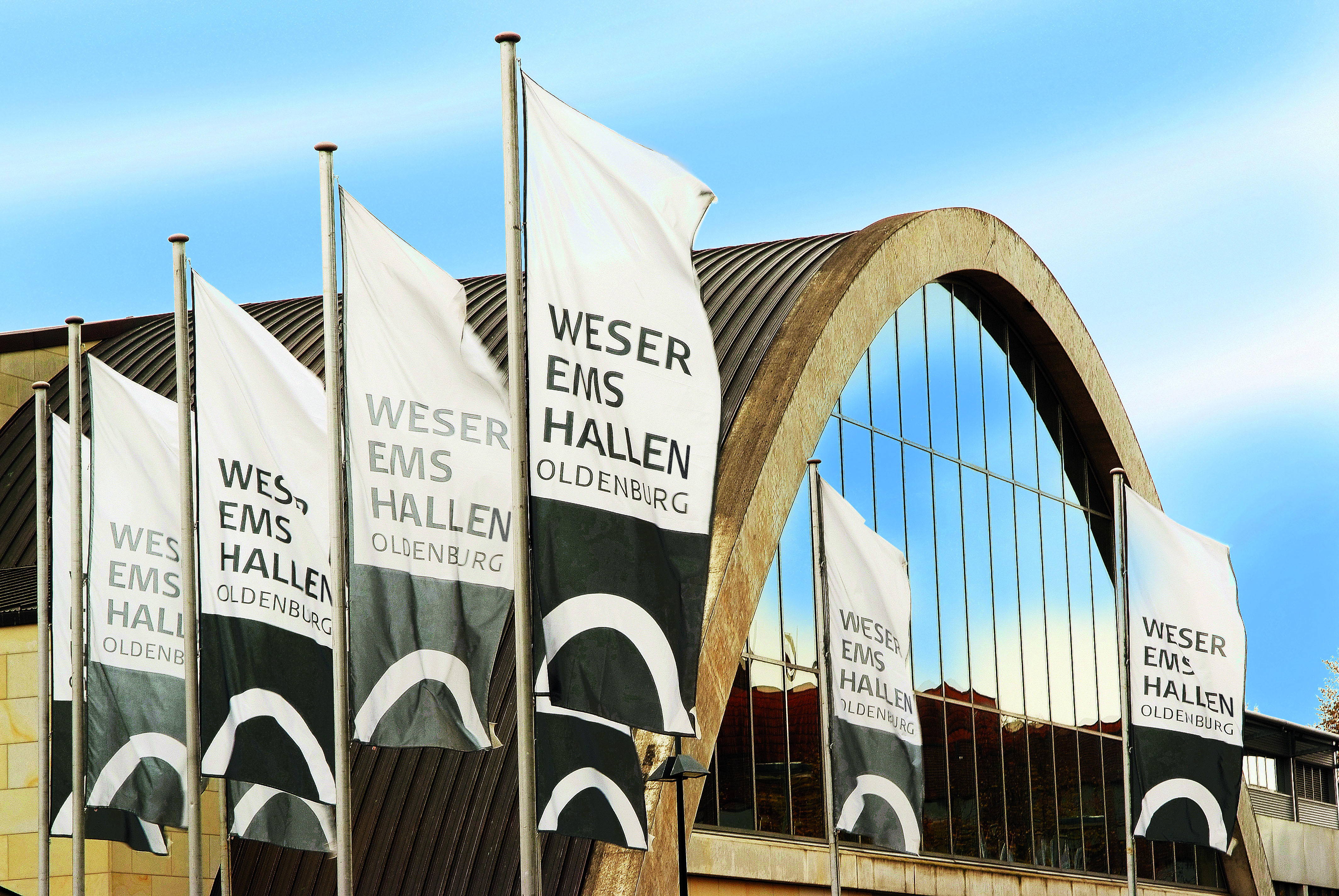 Kongresshalle Außenansicht